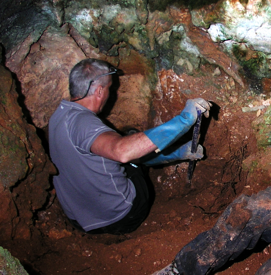 Désobstruction spéléologique dans une grotte du versant sud de la Séranne (Hérault).